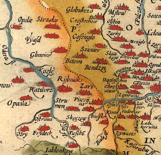 Map of Poland, researched and probably drawn by Wenceslaus Godreccius, printed by Abraham Ortelius in his Theatrum Orbis Terrarum in 1592 (first edited perhaps in 1578). An interesting feature are Polish names even outside the Polish Commonwealth, especially in Silesia.